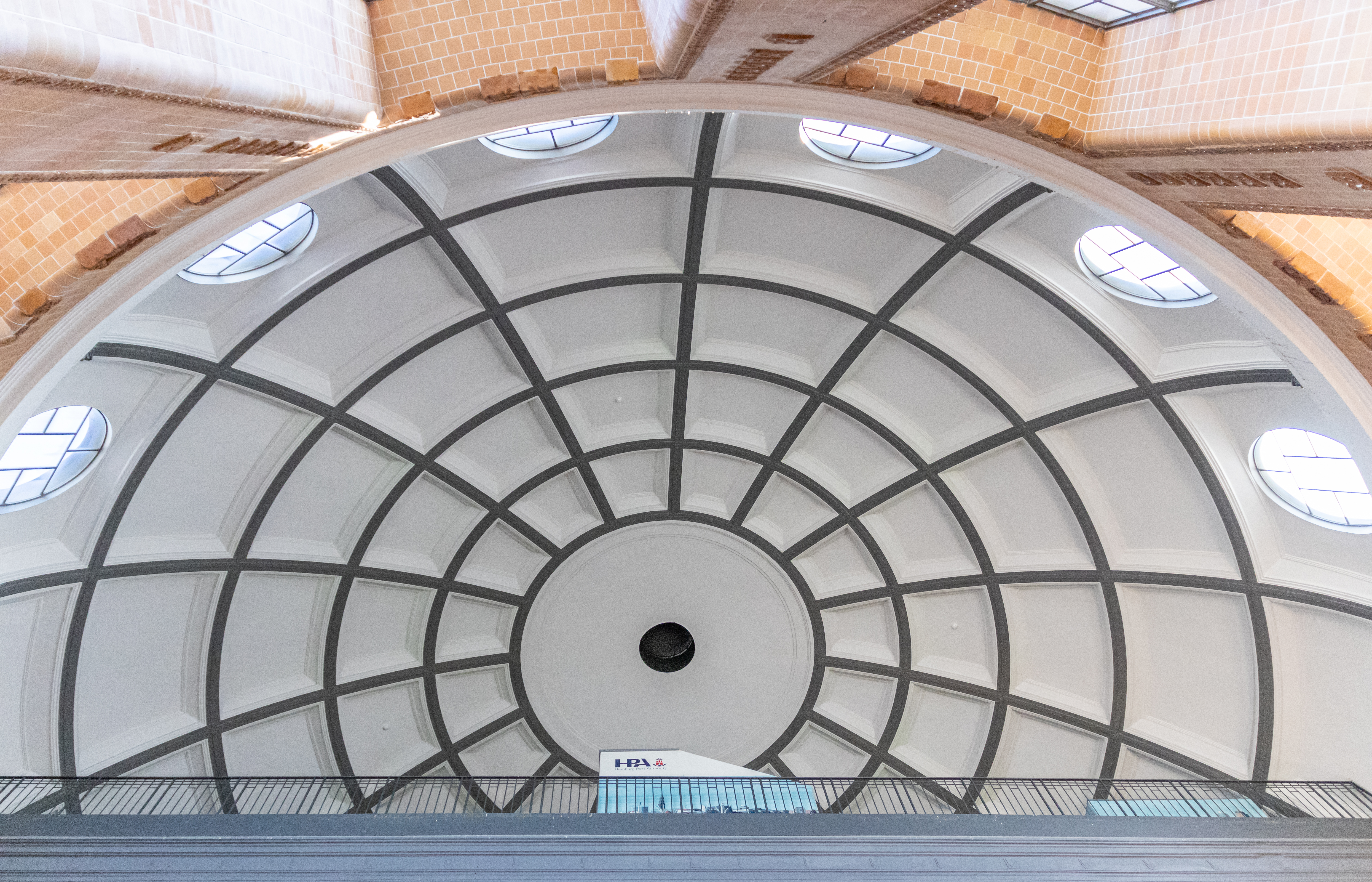 Alter Elbtunnel – Kuppel am Nordeingang